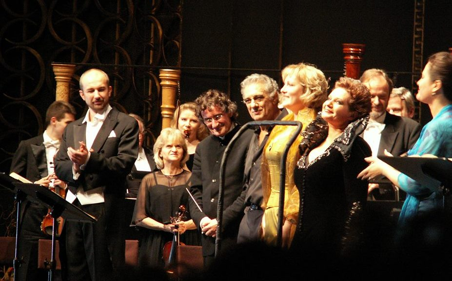 Rafał Siwek podczas koncertowego wykonania Walkirii, Teatr Wielki 2005 (z Placido Domingo, Jackiem Kaspszykiem, Mladą Khudoley i Elżbietą Kaczmarzyk-Janczak), fot. K. Gardzina-Kubała